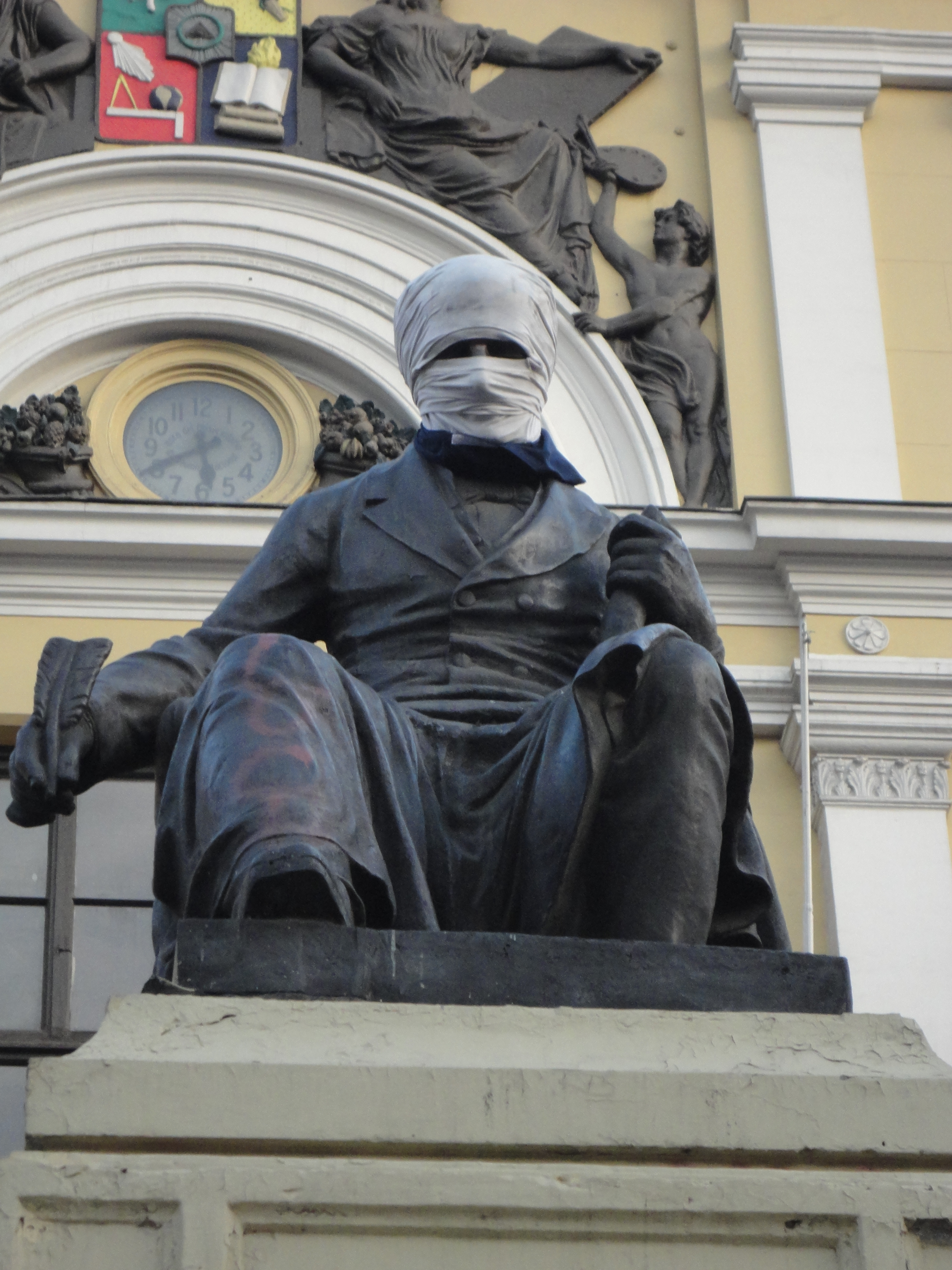 Estatua de Andrés Bello encapuchada, durante la toma de la Universidad de Chile en agosto de 2012.